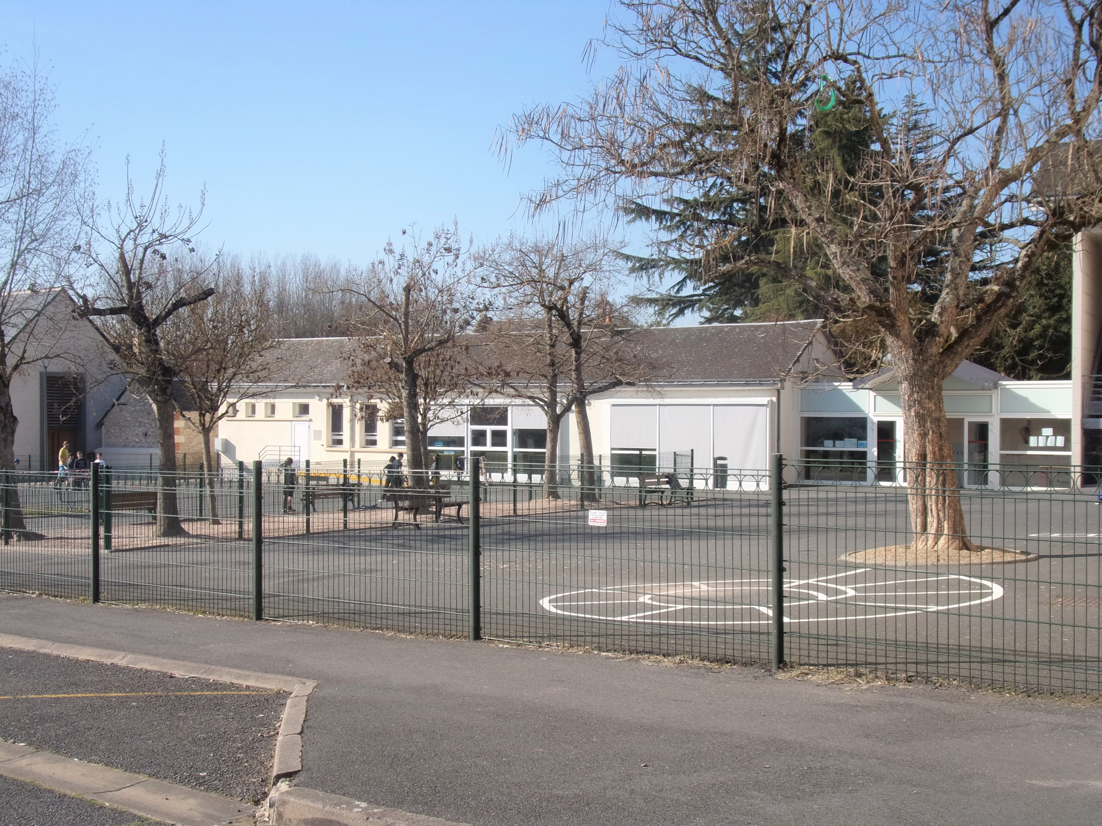 Ecole élémentaire des Varennes à Veigné